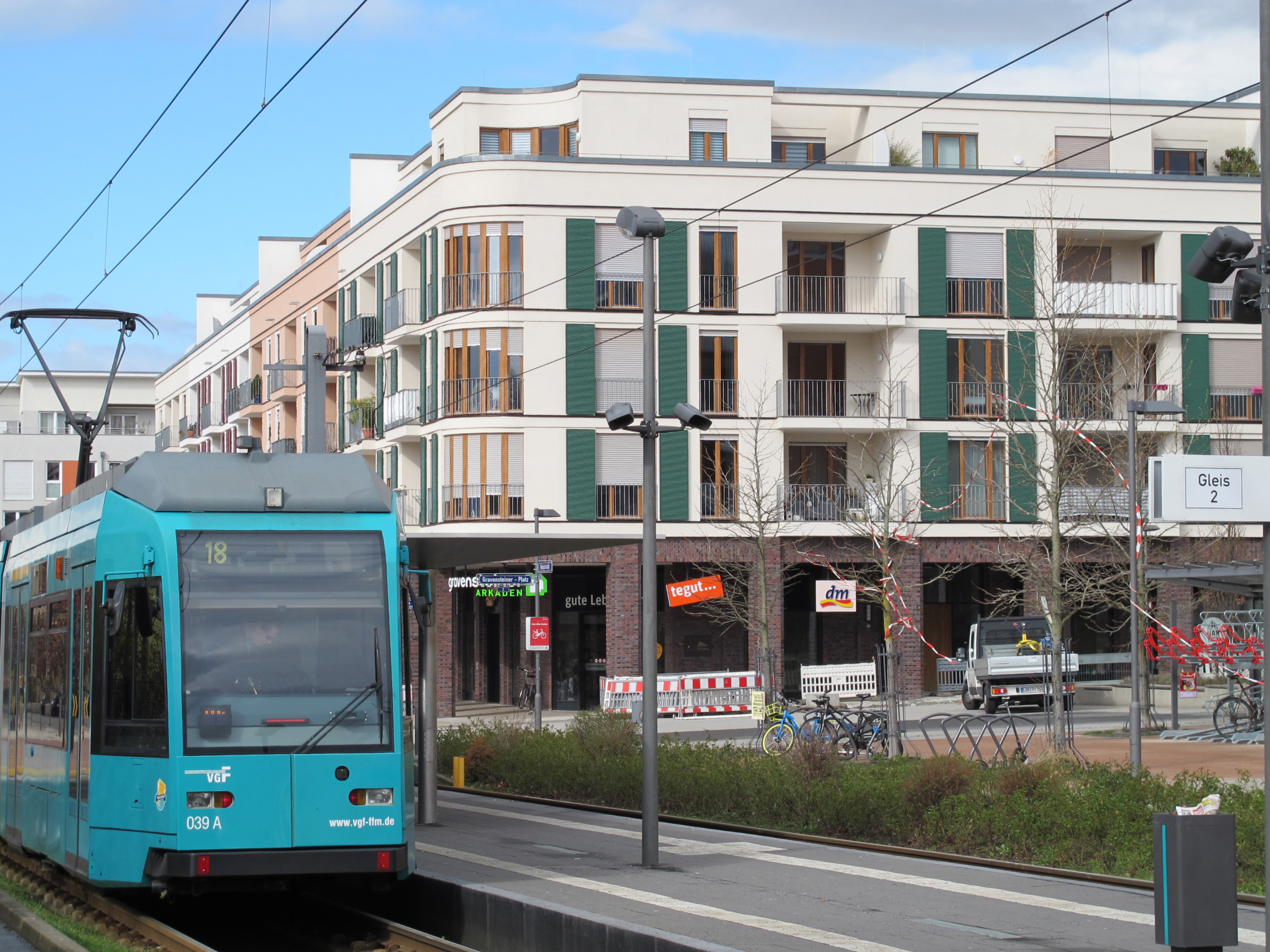 Der Gravensteiner Platz in Frankfurt am Main ist die Endstation der am 11.12.2011 eröffneten Straßenbahnlinie zum Frankfurter Bogen. Der abgebildete Straßenbahnwagen stammt aus der 1997 gelieferten zweiten Serie des von Siemens/Duewag gebauten Typ "R".